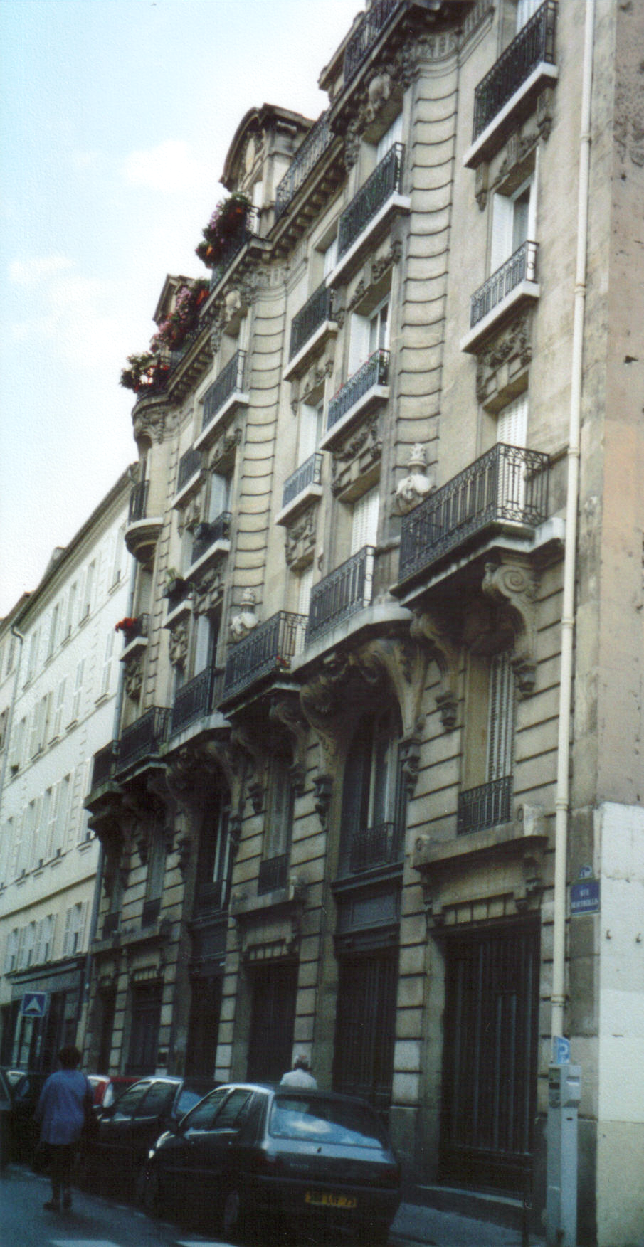 Rue Beautreillis Nr. 17 und 19, Wohnhaus Jim Morrisons in Paris, eigene Aufnahme, gescannt mit 300 dpi, eigene Sammlung